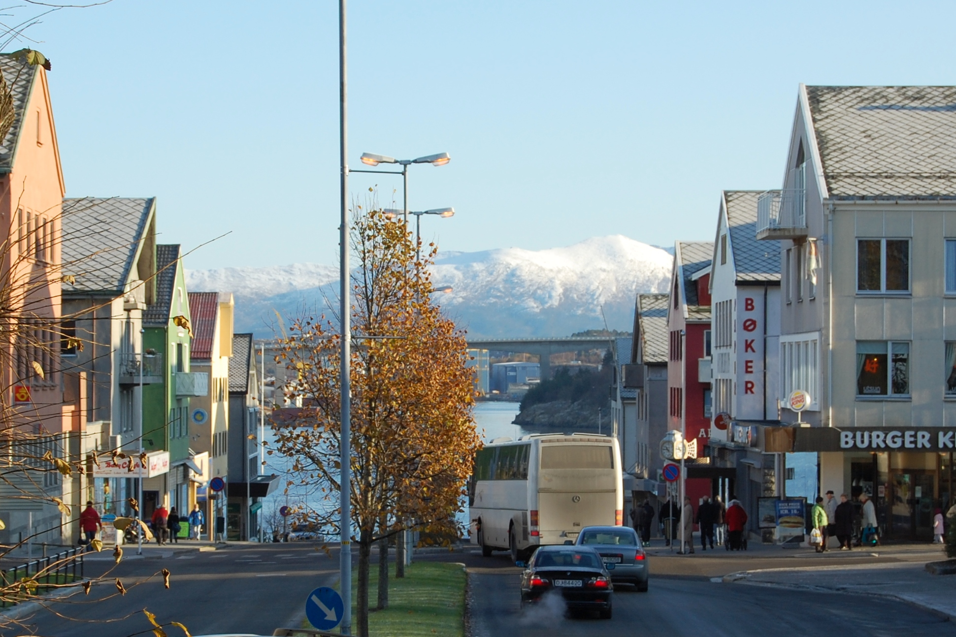 Kaibakken] i Kristiansund, MR. Fjellene i bakgrunnen er på Tustna Kaibakken var et viktig element i gjenreisningsbyen Kristiansund. Fjellene på Tustna er trukket inn av arkitekt Sverre Pedersen som et bevisst motiv i byens hovedgate.